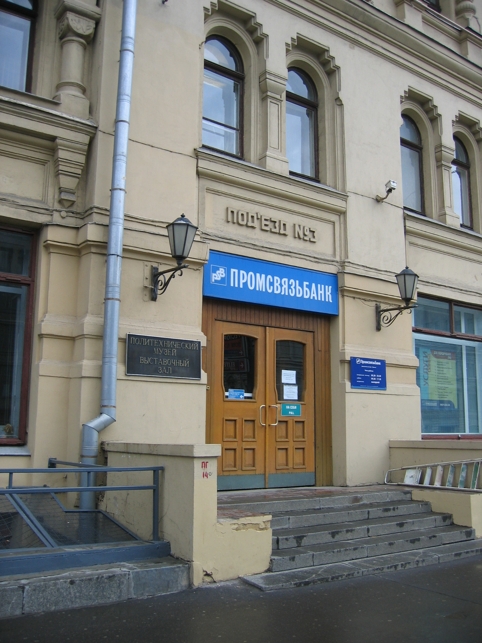 Промсвязьбанк, Moscow